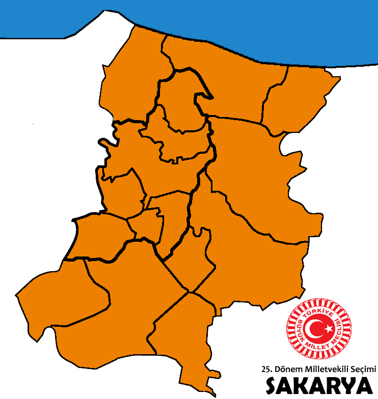 2015 genel seçim sonuçları